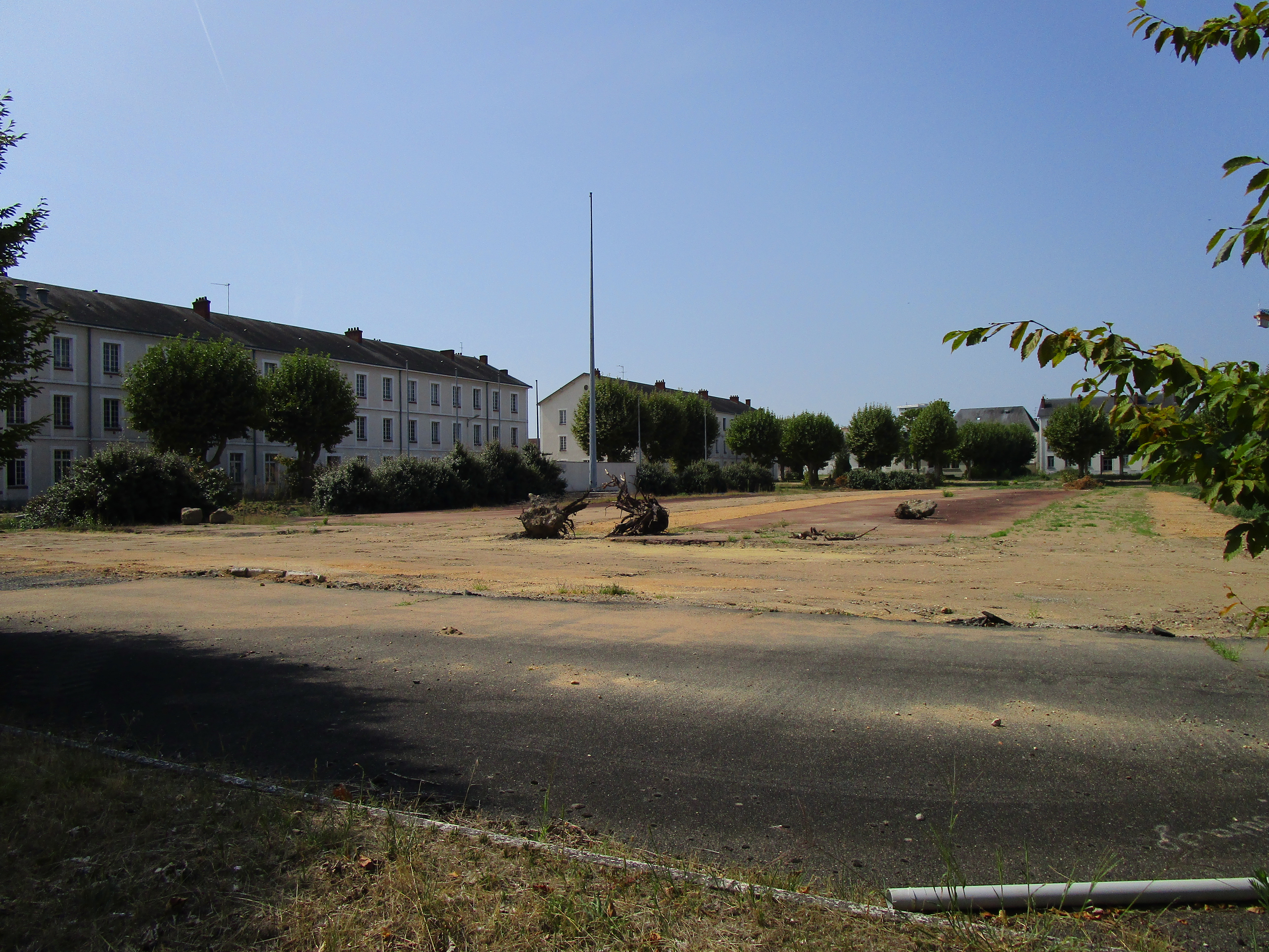 L'ancienne caserne Beaumont de Tours.